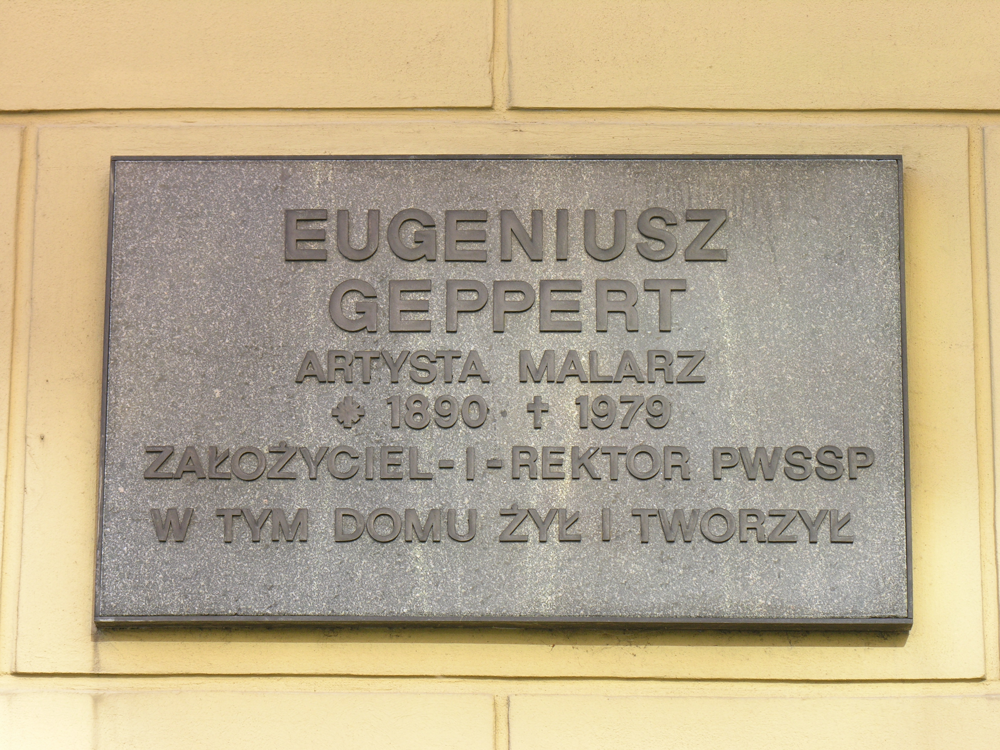 Tablica ku czci Eugeniusza Gepperta przy ul. Gepperta 2 we Wrocławiu